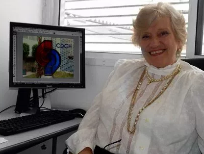 Deanna Marcano, profesora de la UCV. Foto tomada en el Consejo de Desarrollo Científico y Humanístico de la UCV